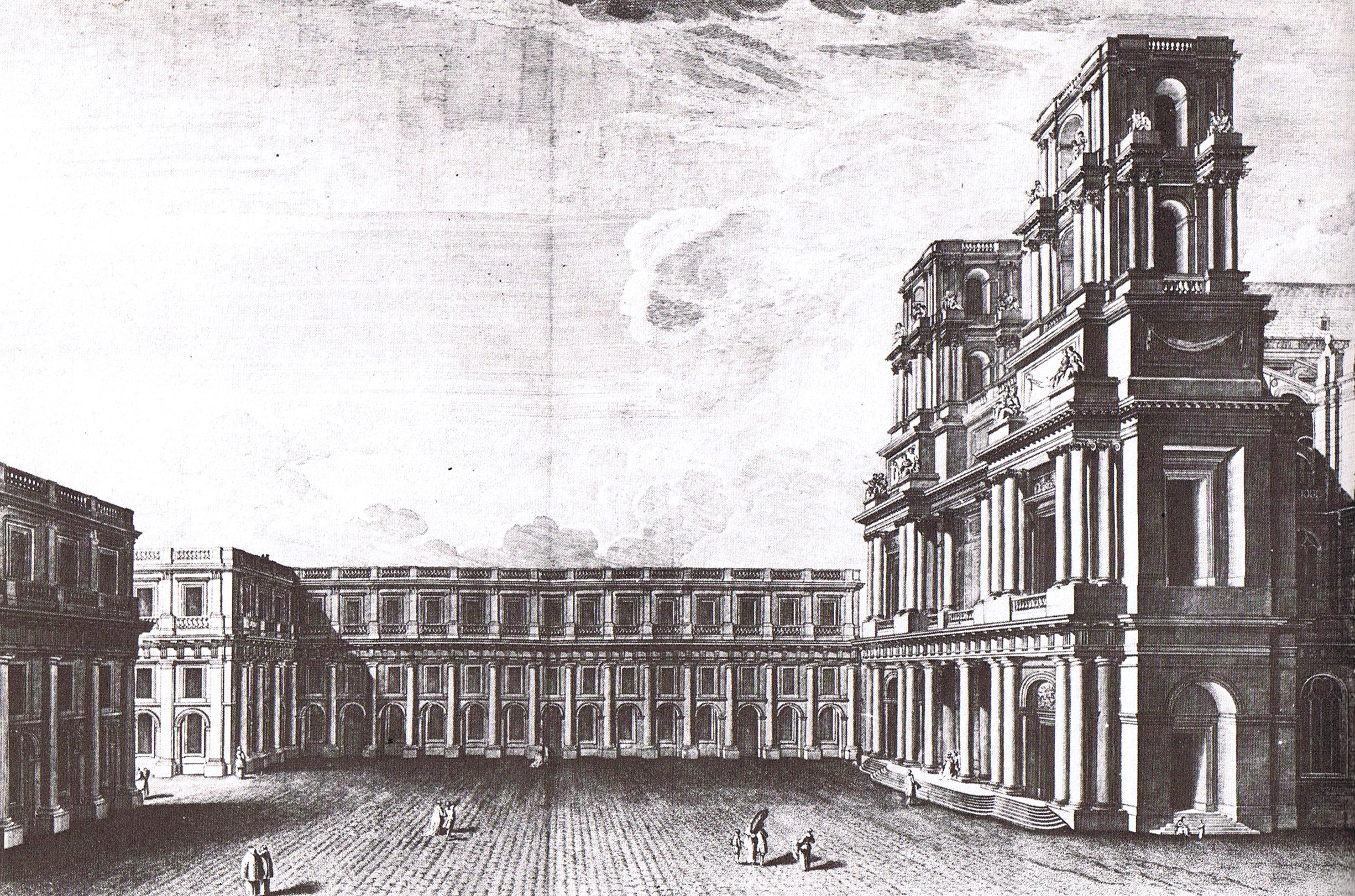 Projet de place Saint-Eustache, devant l'église du même nom.